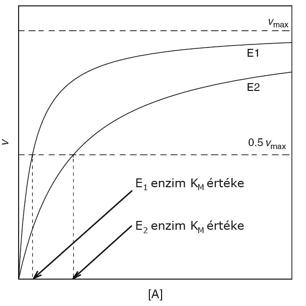 Enzimkinetika-2 enzim